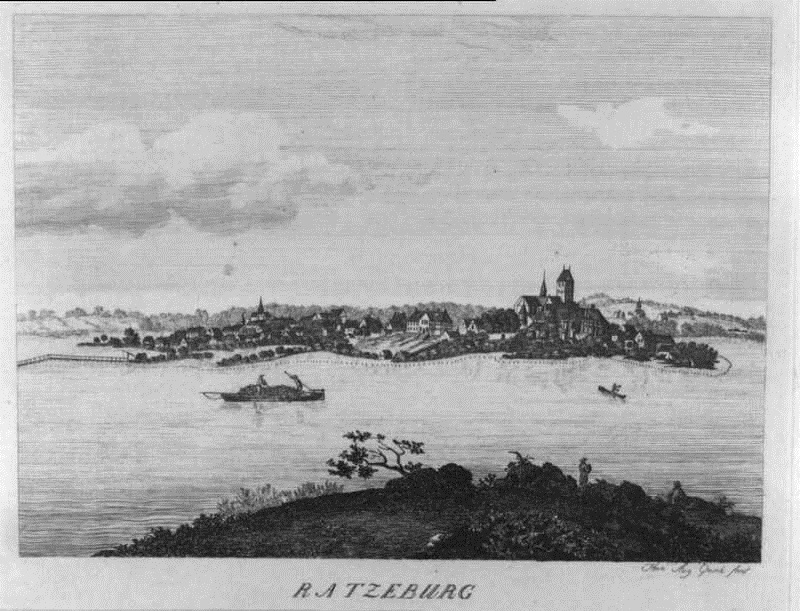 Heinrich August Grosch: Ratzeburg - Tyskland - prospekt - Slesvig - Holsten Tilhører Det Kongelige Bibliotek